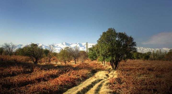 a shot of Abhar's Gardens by Amir Hosein Sadeghian under Creative Commons.